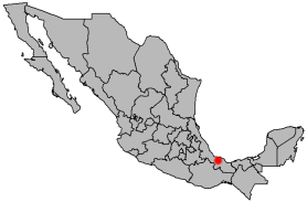 Locator map of Tlacotalpan, Veracruz, Mexico